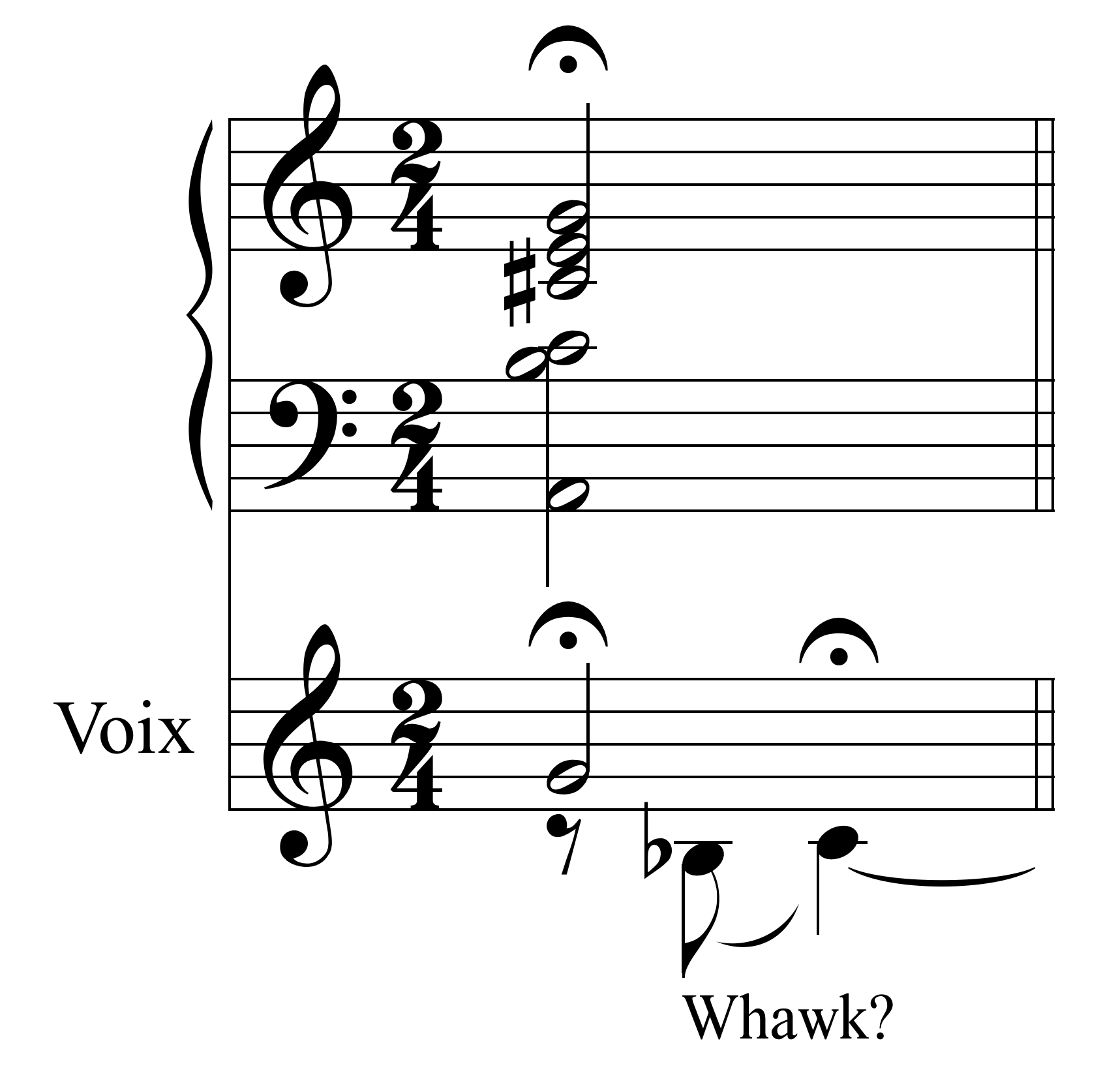 Extrait de la pièce XXV d'Anna Livia Plurabelle d'André Hodeir